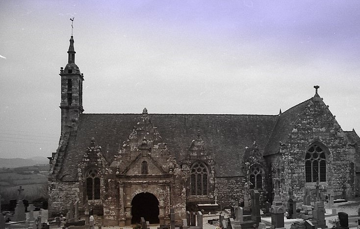 église Lannédern, denez goasguen.